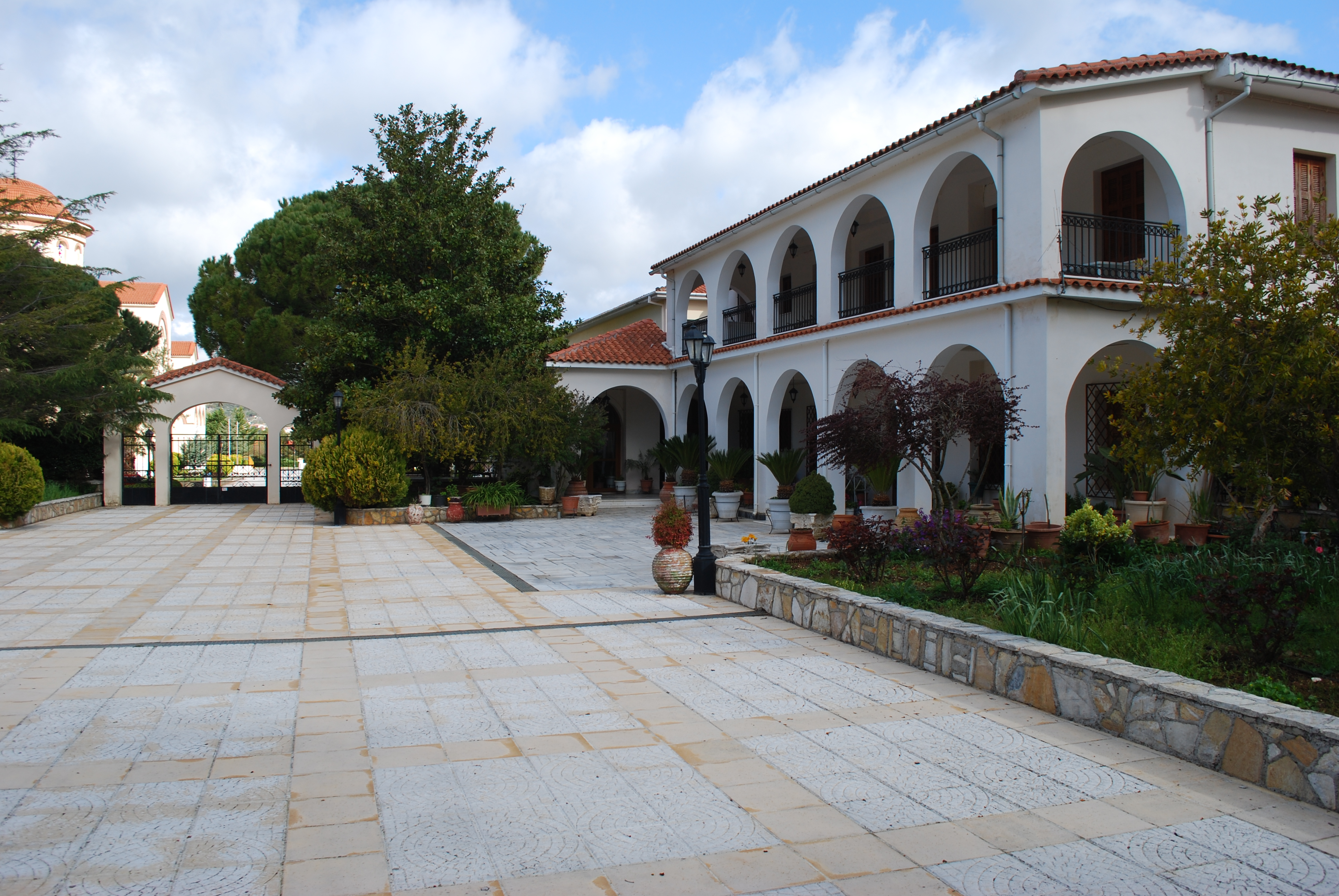 Vue du monastère de Agios Gerasimos à Kephalonia.